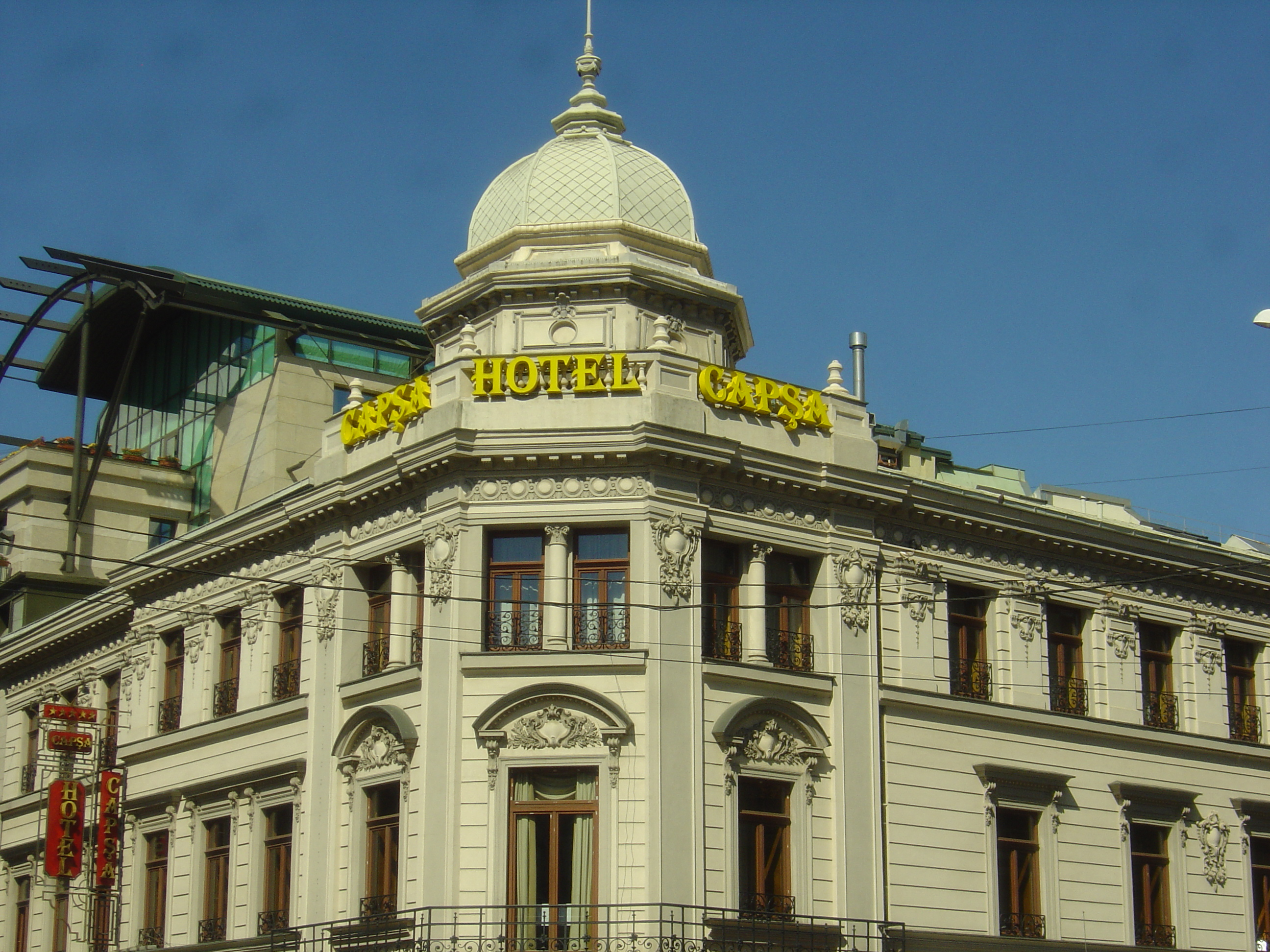 Το Καφέ Κάπσα στο Βουκουρέστι (γενική άποψη)